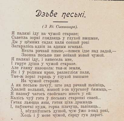 “Дзве песні”. Пераклад Максіма Багдановіча (пад псеўданімам Максім Крыніца) верша рускага паэта Ю. Святагора “Две песни”. 1909 г. Друкаванае. Газета “Наша ніва”. 1909. № 19. 7 мая. Факсімільнае выданне. С. 273